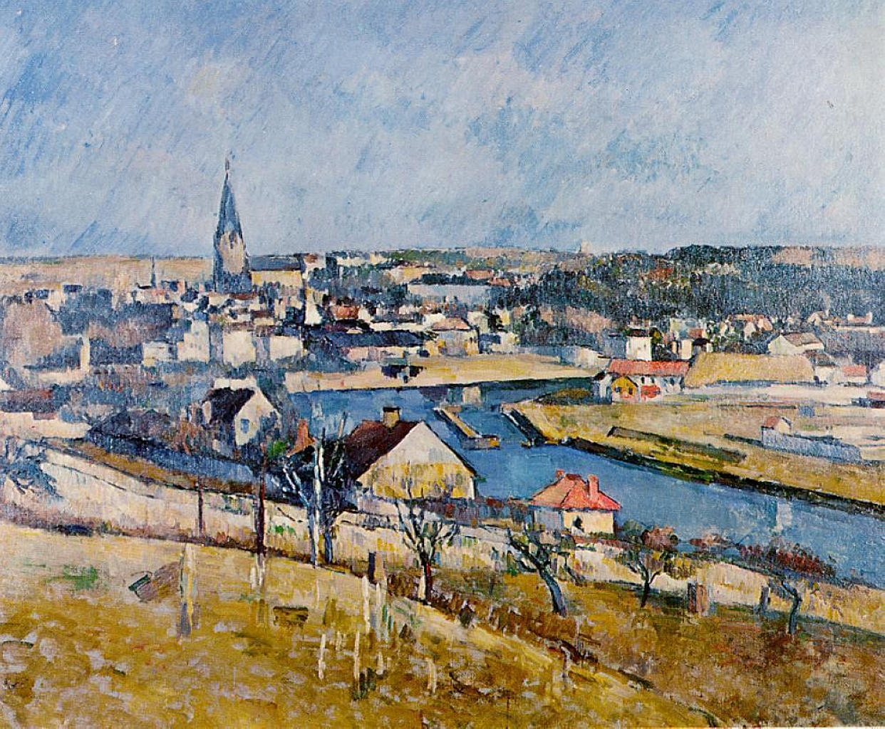 Représentation d'un paysage de l'Ile-de-France par Paul Cézanne(1839-1906). Le lieu n'est pas précisé, mais il s'agit probablement de Melun (Seine-et-Marne), où le peintre a séjourné entre 1879 et 1880. Le lieu a également été attribué à Cergy et Pontoise, prêt d'Auvers-sur-Oise (Val d'Oise). Collection privée.